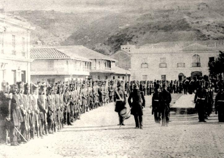 Fotos históricas de Valparaíso en Chile